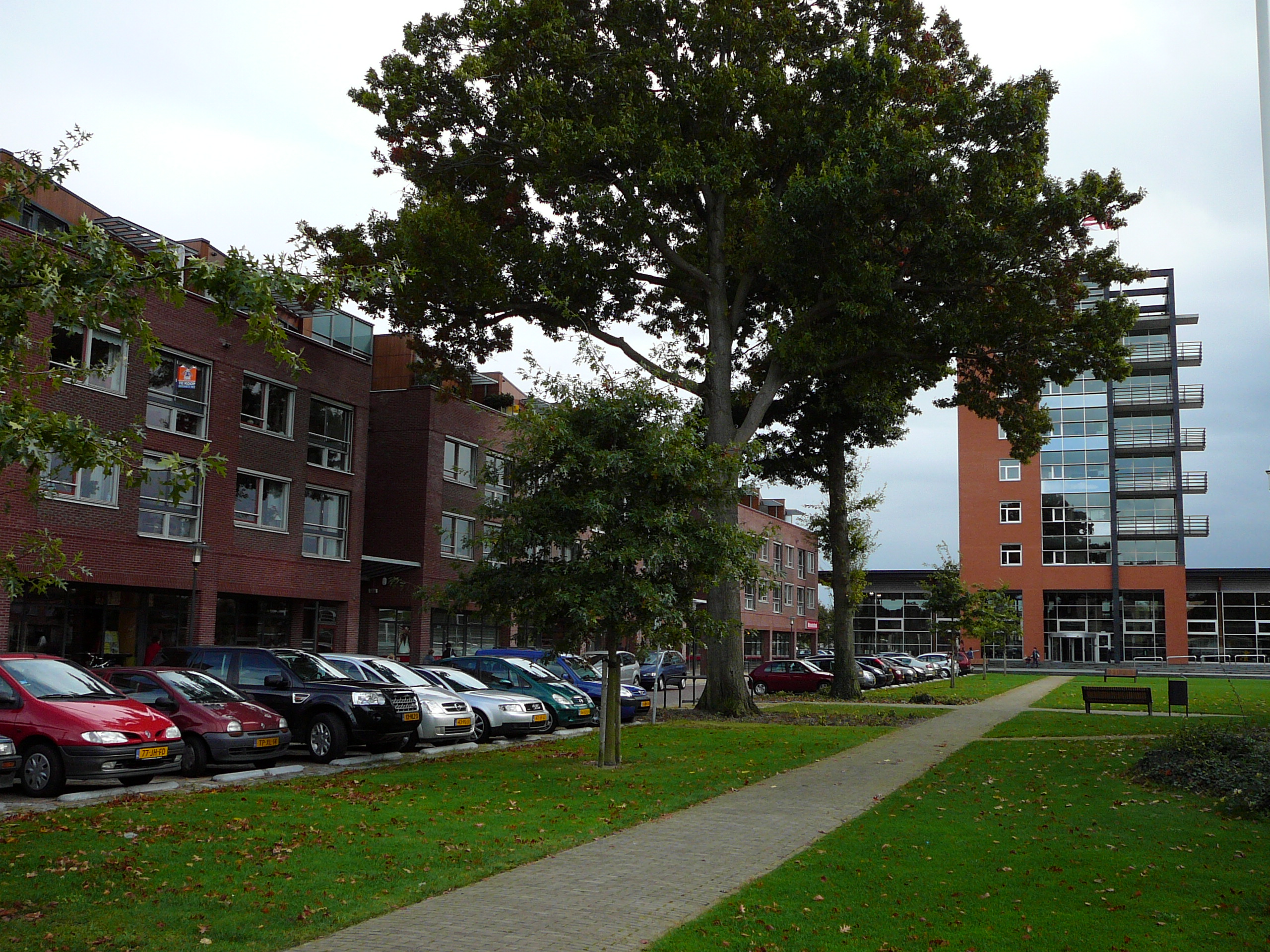 Het nieuwe gemeentehuis van Weststellingwerf